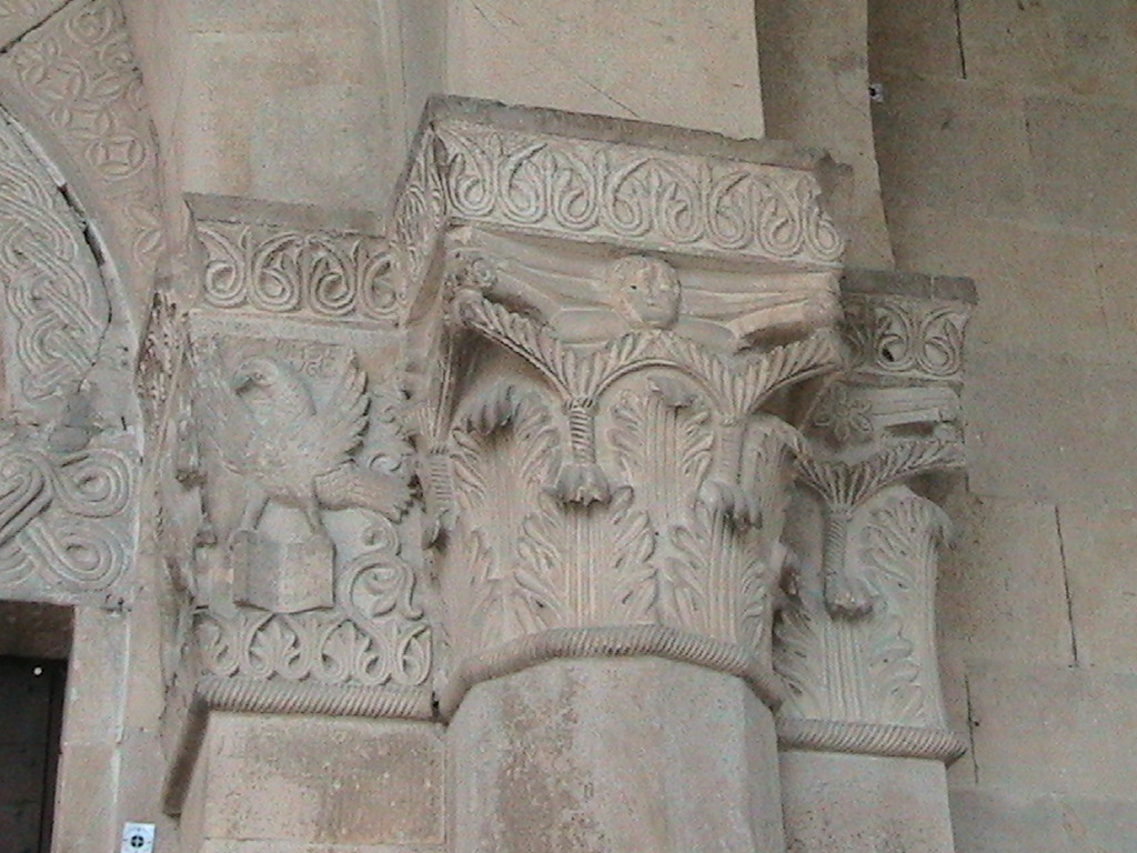 La Badia Cavana (San Basilide) a San Michele Cavana - capitelli del protiro